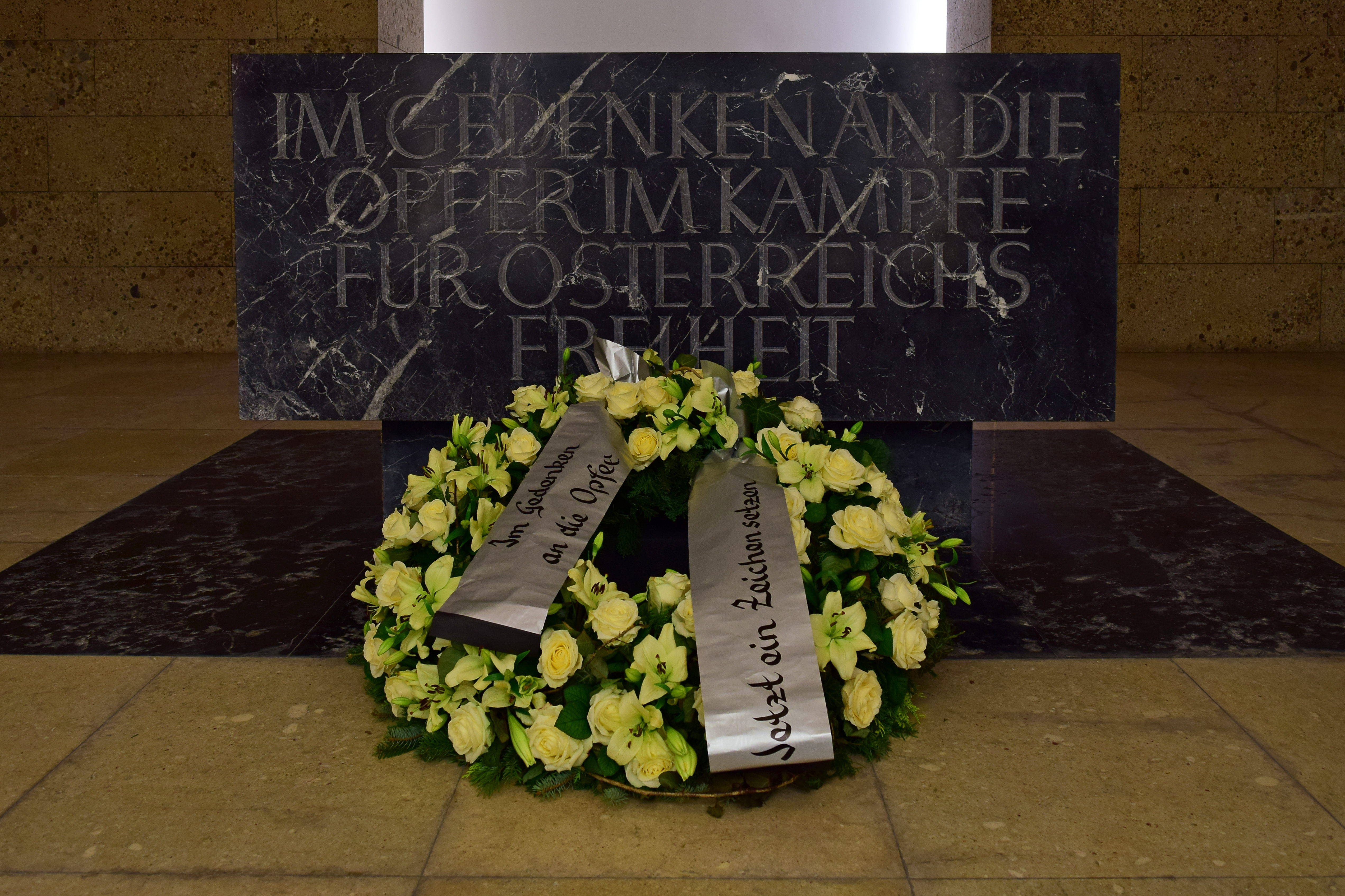 Gedenkkundgebung 70 Jahre Befreiung von Auschwitz am 27. Jänner 2015, dem Internationalen Holocaust-Gedenktag. Das Bild zeigt den niedergelegten Kranz im Weiheraum des äußeren Burgtors.